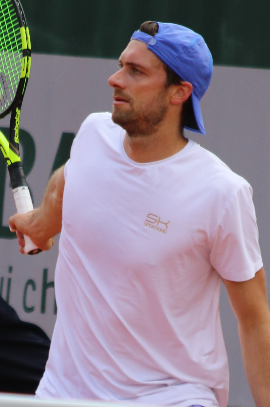 Brands RGQ19 (2)